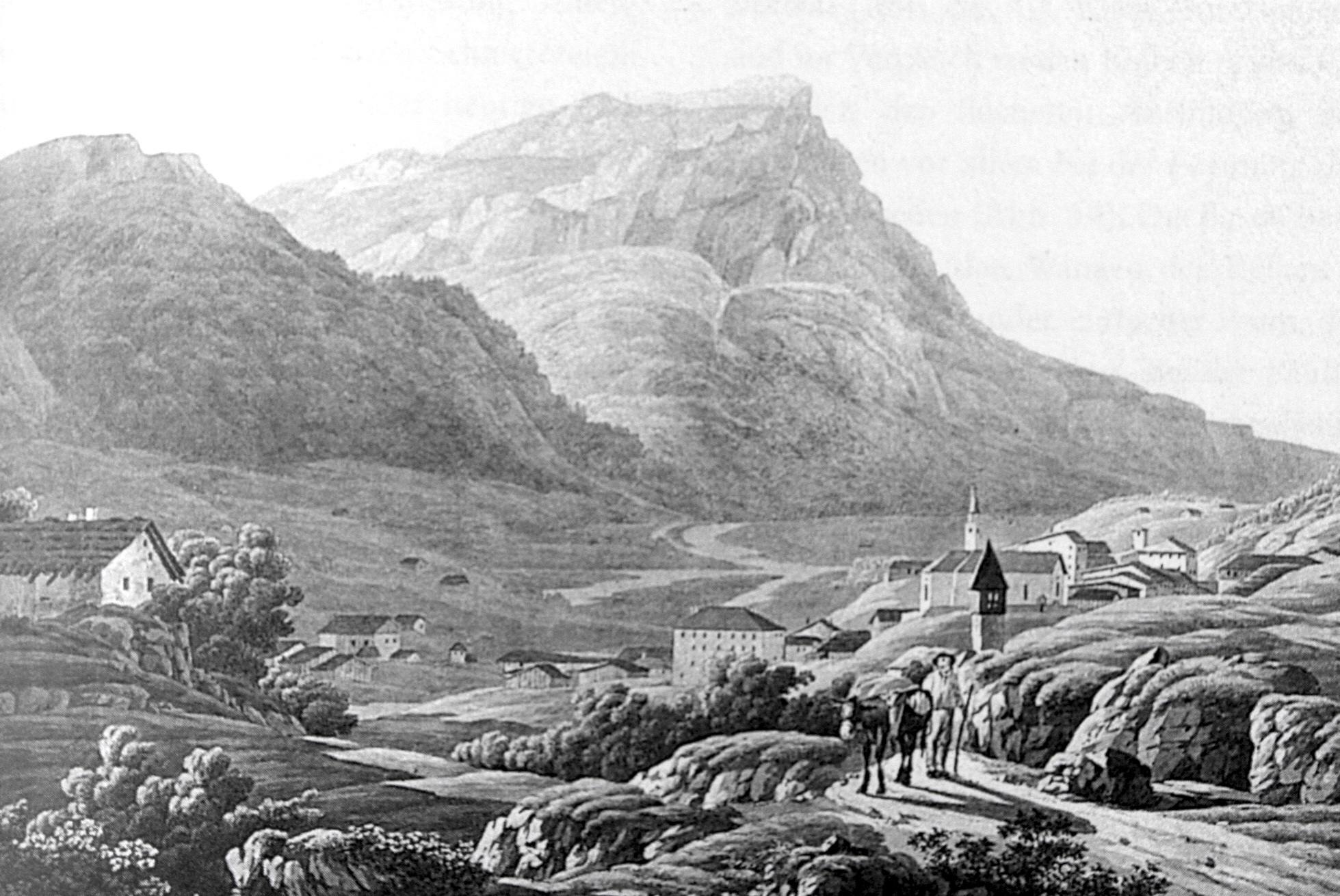 Kirchenruine St. Urban und Vincentius in Splügen GR